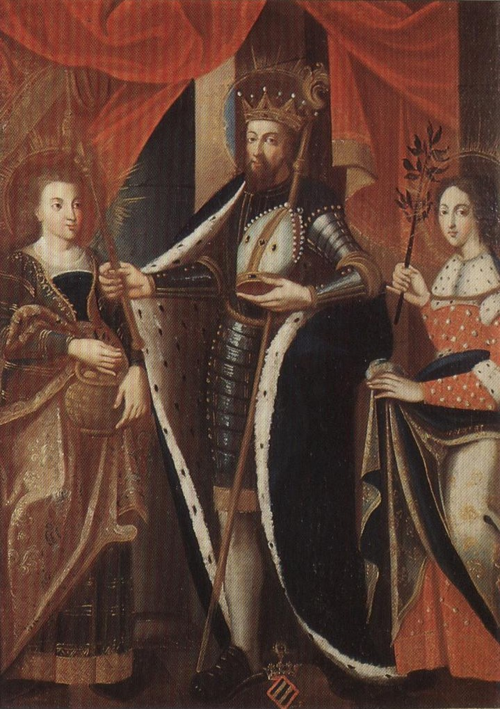 St-Goéry, évêque de Metz, peint en seigneur d'Aquitaine (habit militaire, couronne et blason à ses pieds) et tenant ses attrtibuts épiscopaux en main gauche (mître et crosse); à droite sa fille St-Précie portant vétement d'abbesse (manteau de laine noire à colleret d'hermine)(peut-être l'abbesse Mme de Ludres commanditaire du tableau?) et à gauche Ste-Victorine vestue en habit de coeur comme les chanoinesses lors de cérémonies. Ce sont les deux filles de St-Goéry; cf la fiche PM88000283 du 22 juillet 1993 de la Base Mérimée[1]